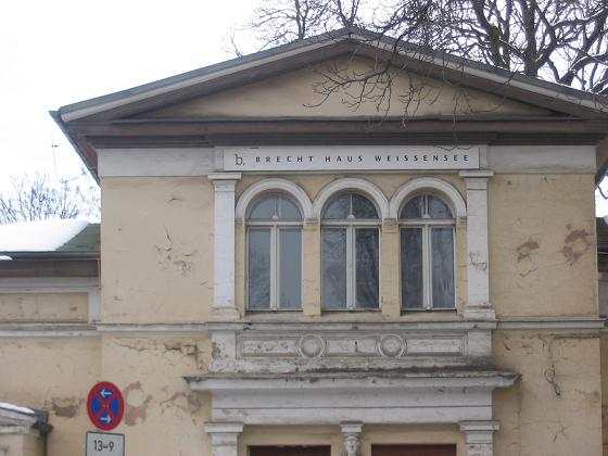 Brecht-Haus in Berlin-Weißensee